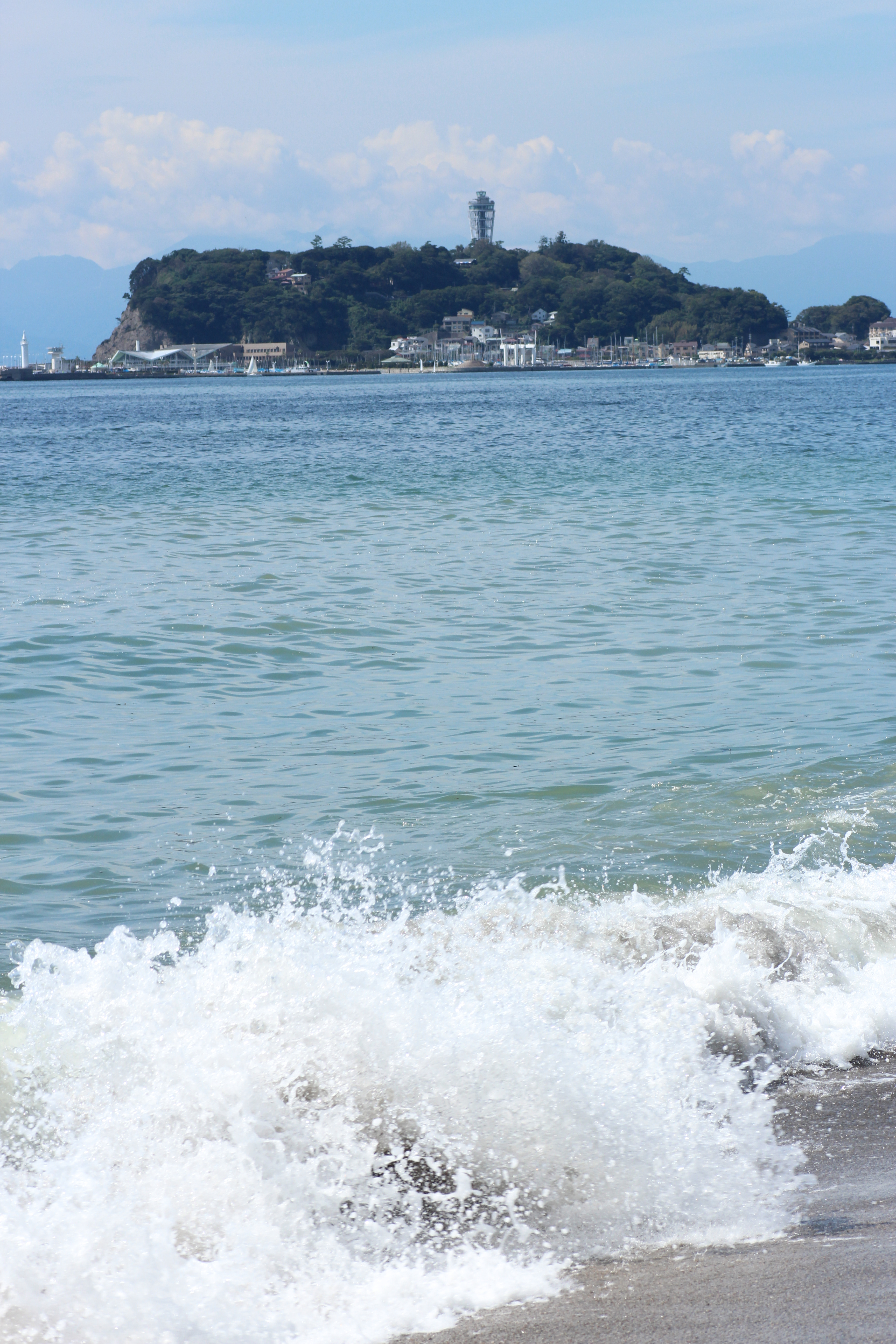 大分秋らしく涼しくなった９月２４日に撮影した江ノ島です。